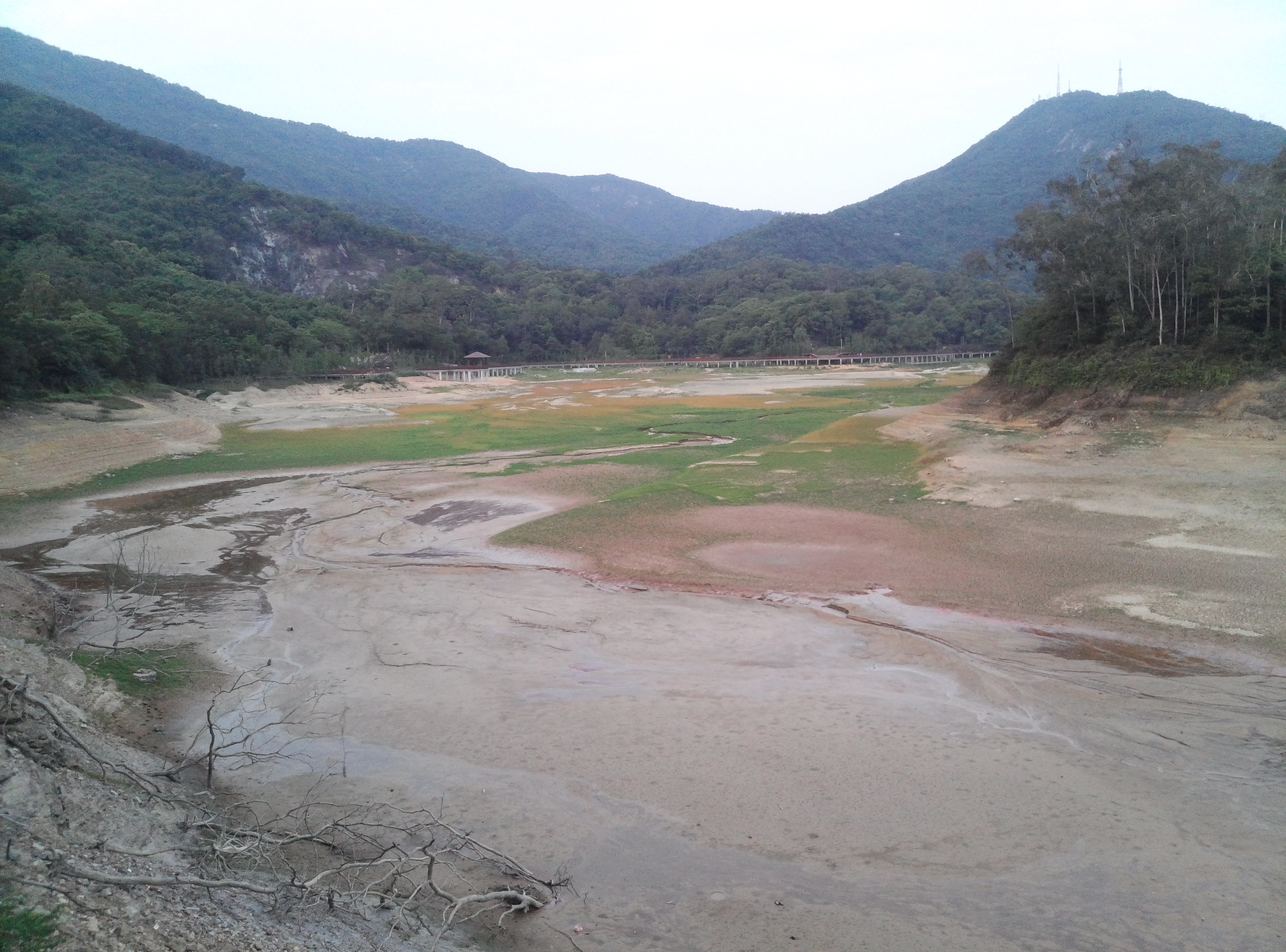 因蓄水減少，水底露出。右方遠處為圭峰山，左方為雲峰。